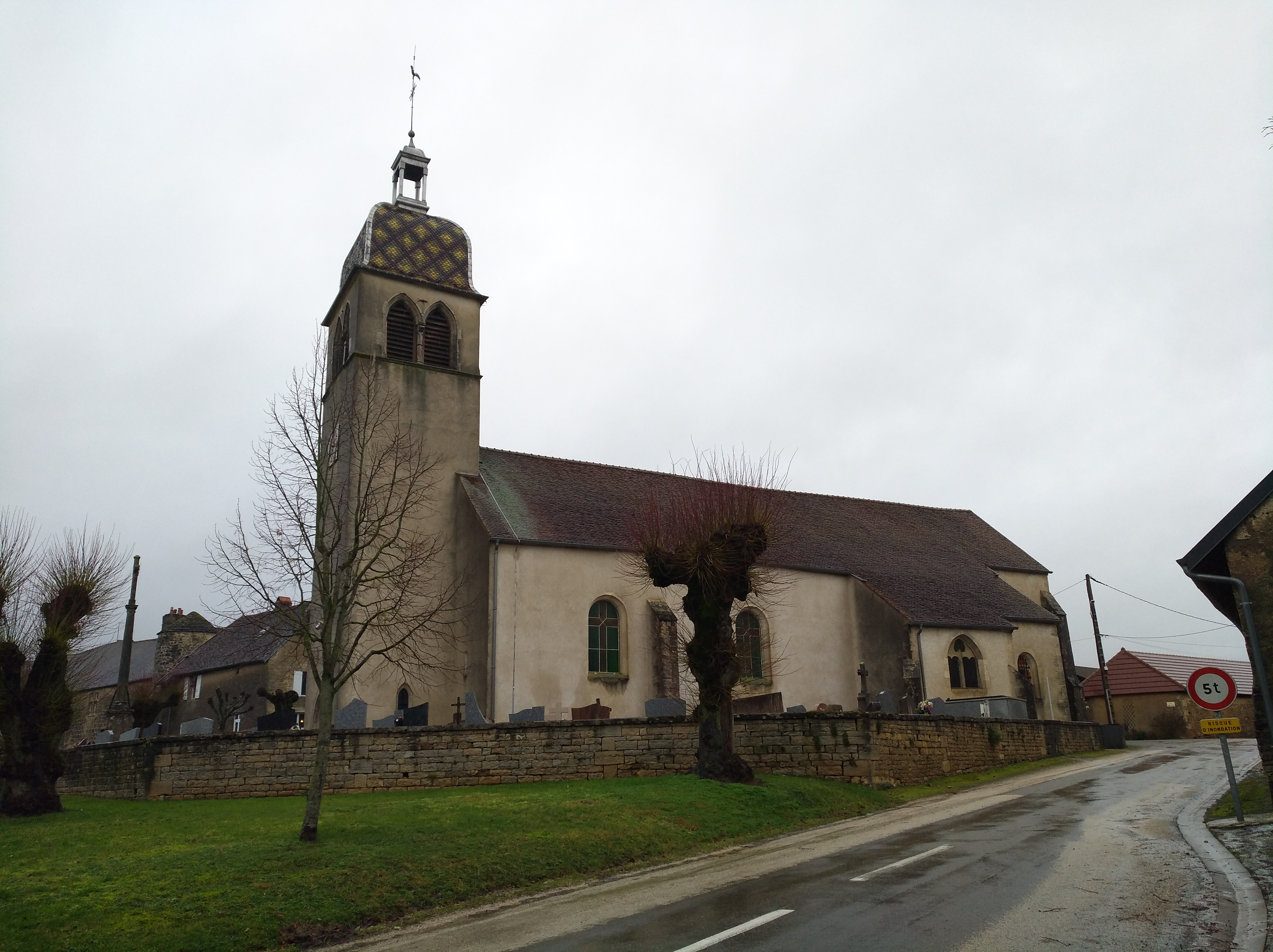 Lavans-lès-Dole (Jura, France) en janvier 2018.